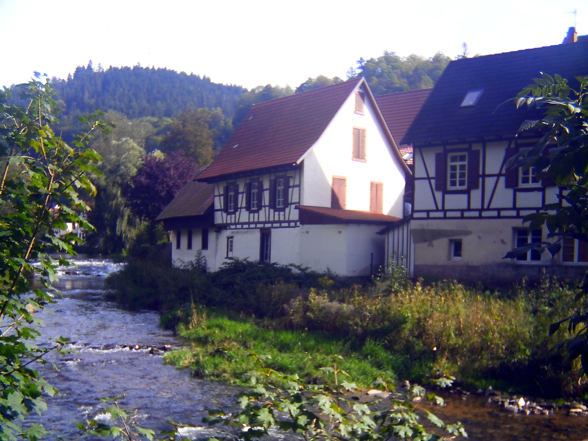 Kinzig River at Schiltach